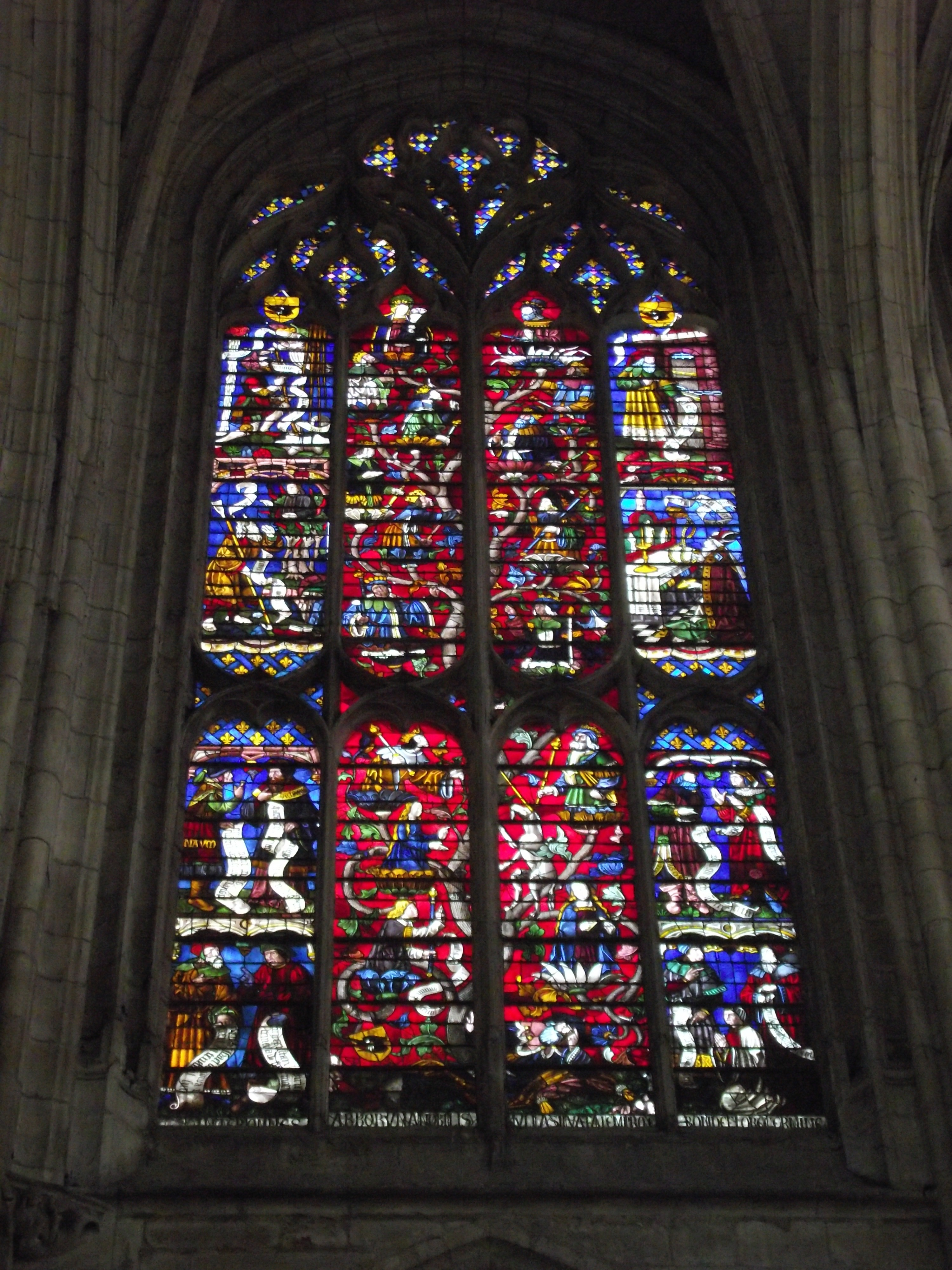 Sens, Cattedrale di santo Stefano, Vetrata nel transetto sud, XVI secolo